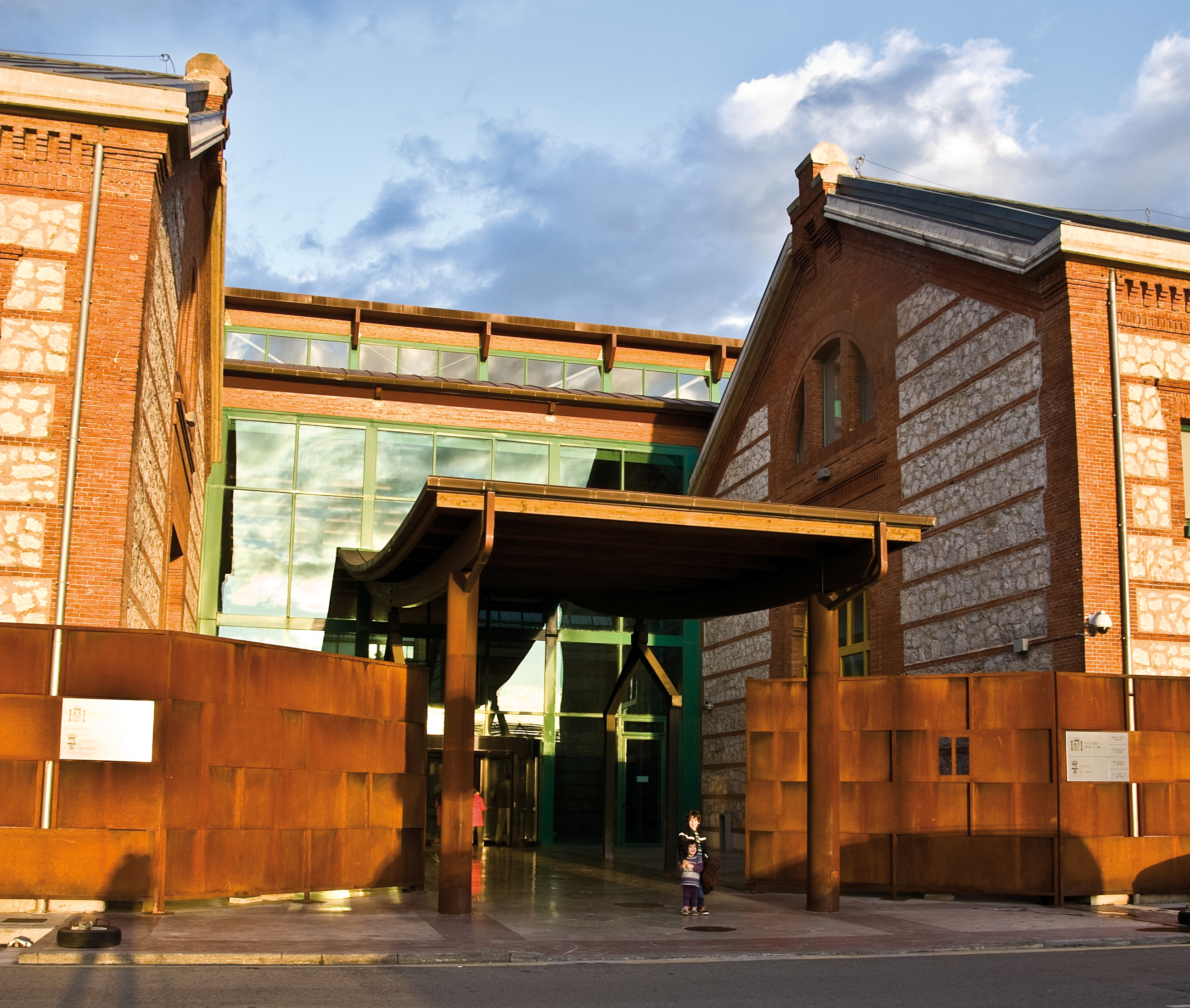 Fachada de la Biblioteca Central de Cantabria.